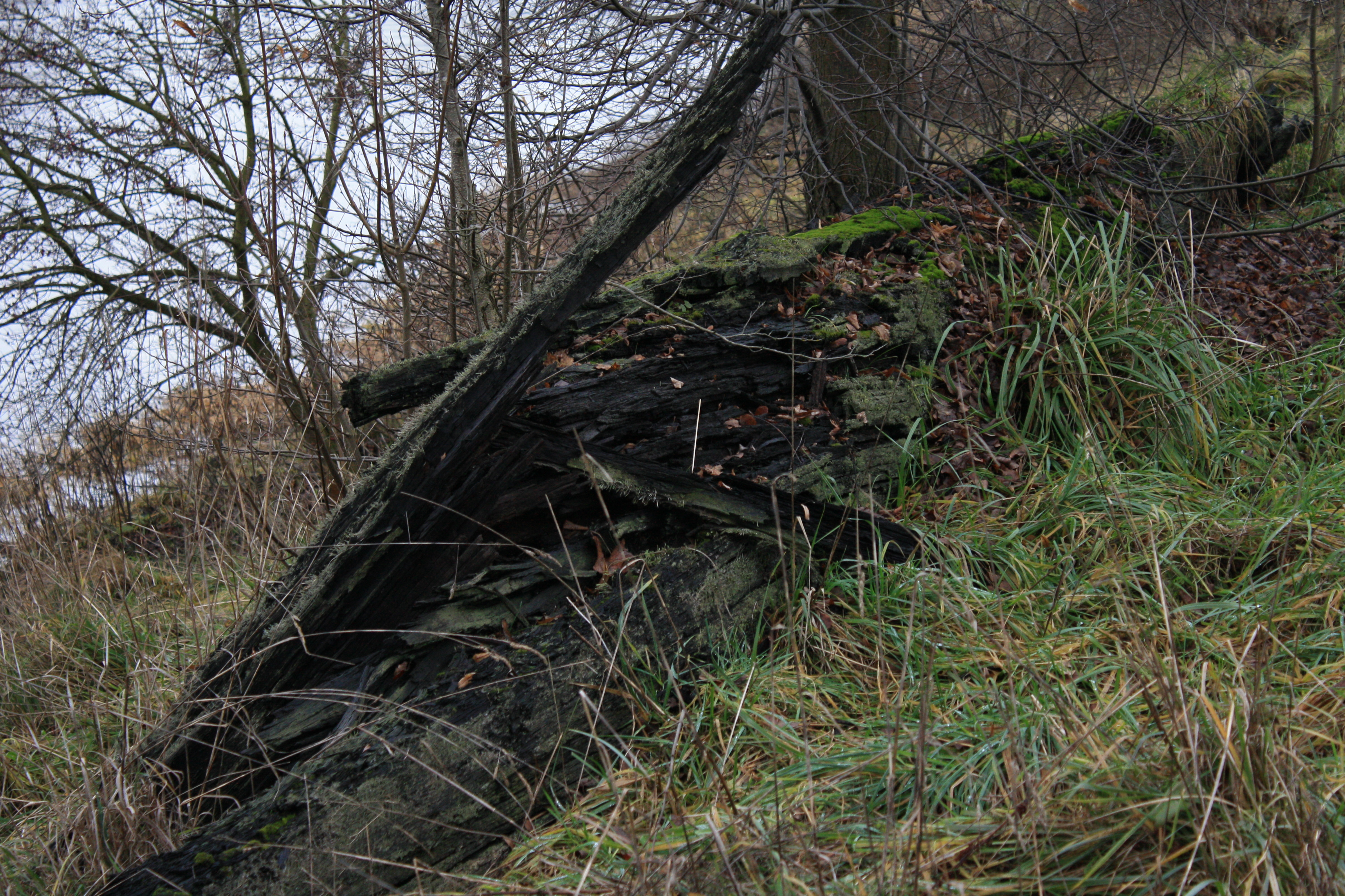 Der Baumstamm wurde nach einem Hochwasser angeschwemmt und verwittert langsam.